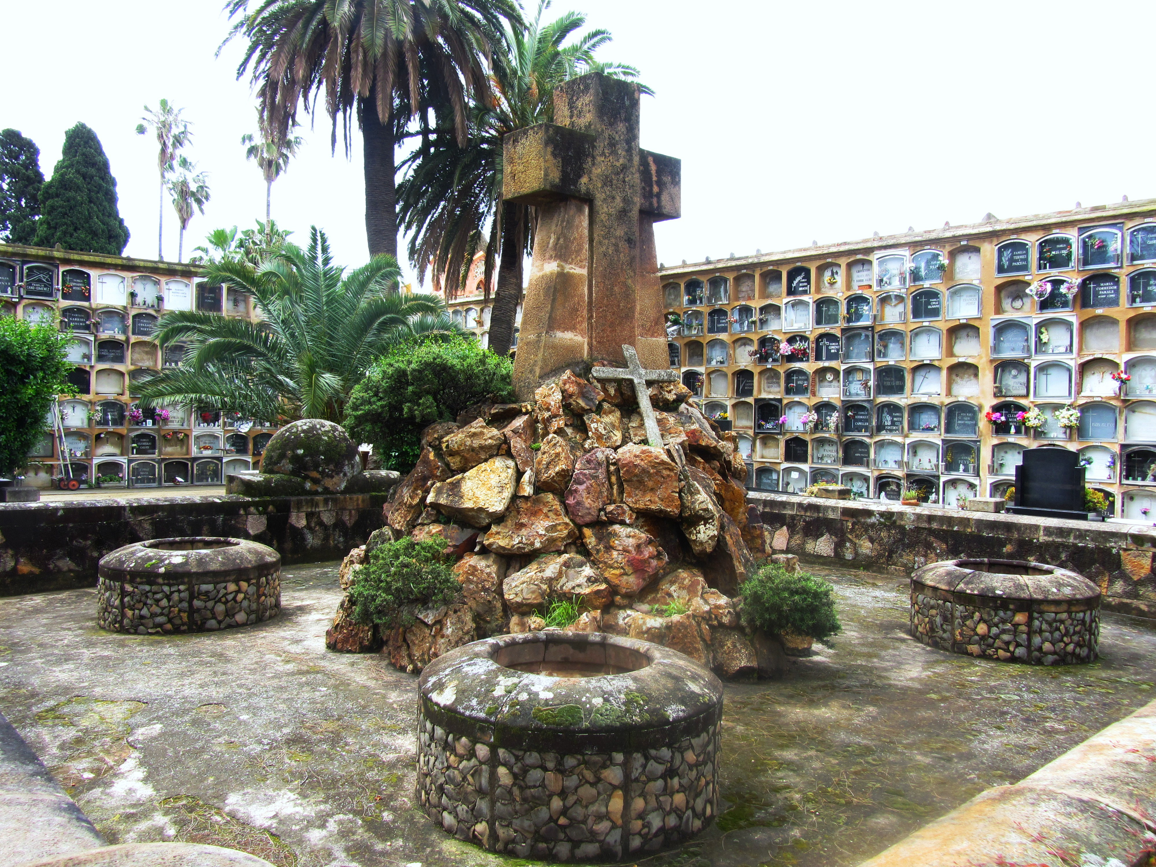 Als repatriats d'Ultramar (anònim). Cementiri de les Corts (Barcelona)